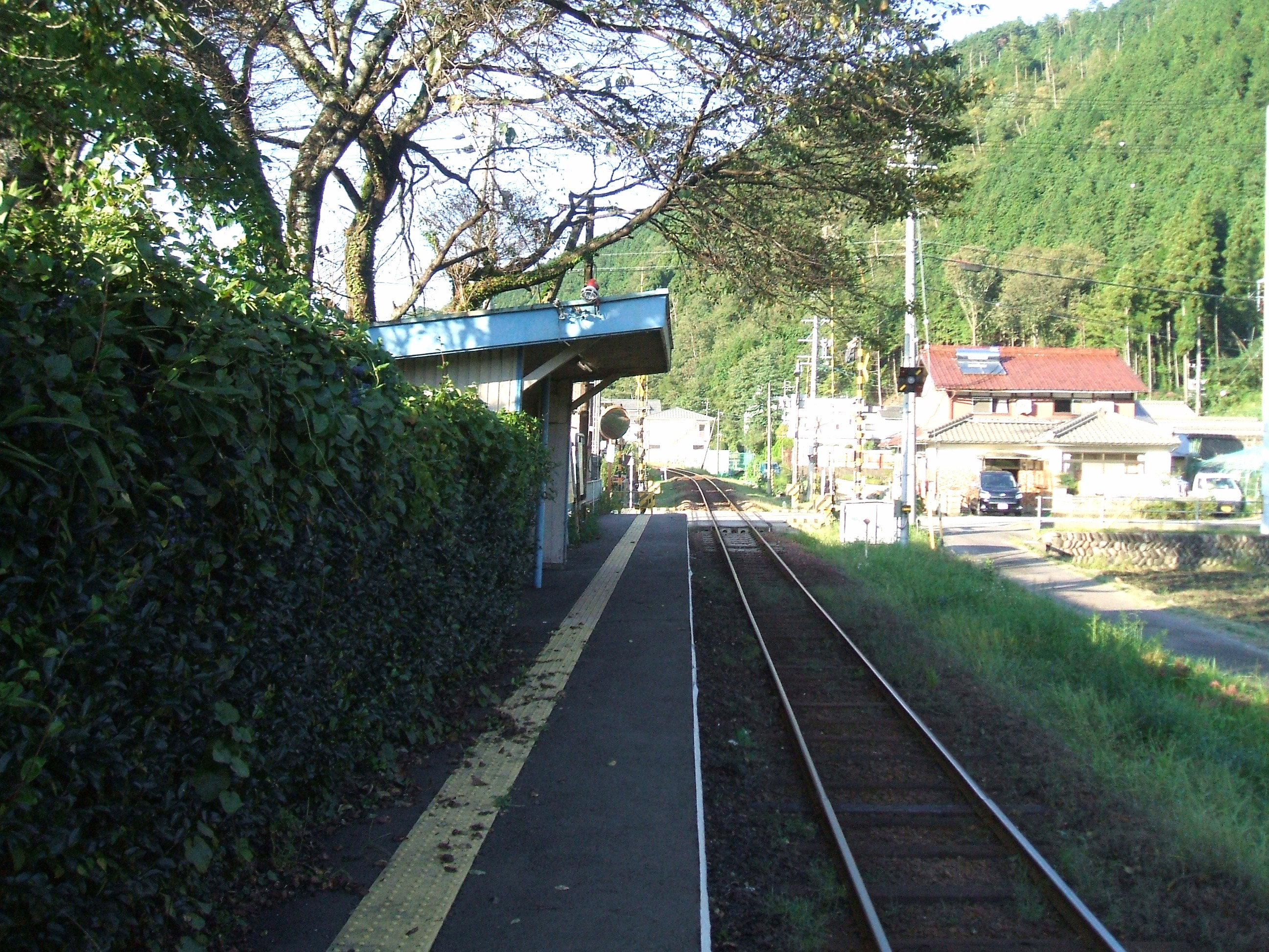 ホームから出入り口方向を見る。